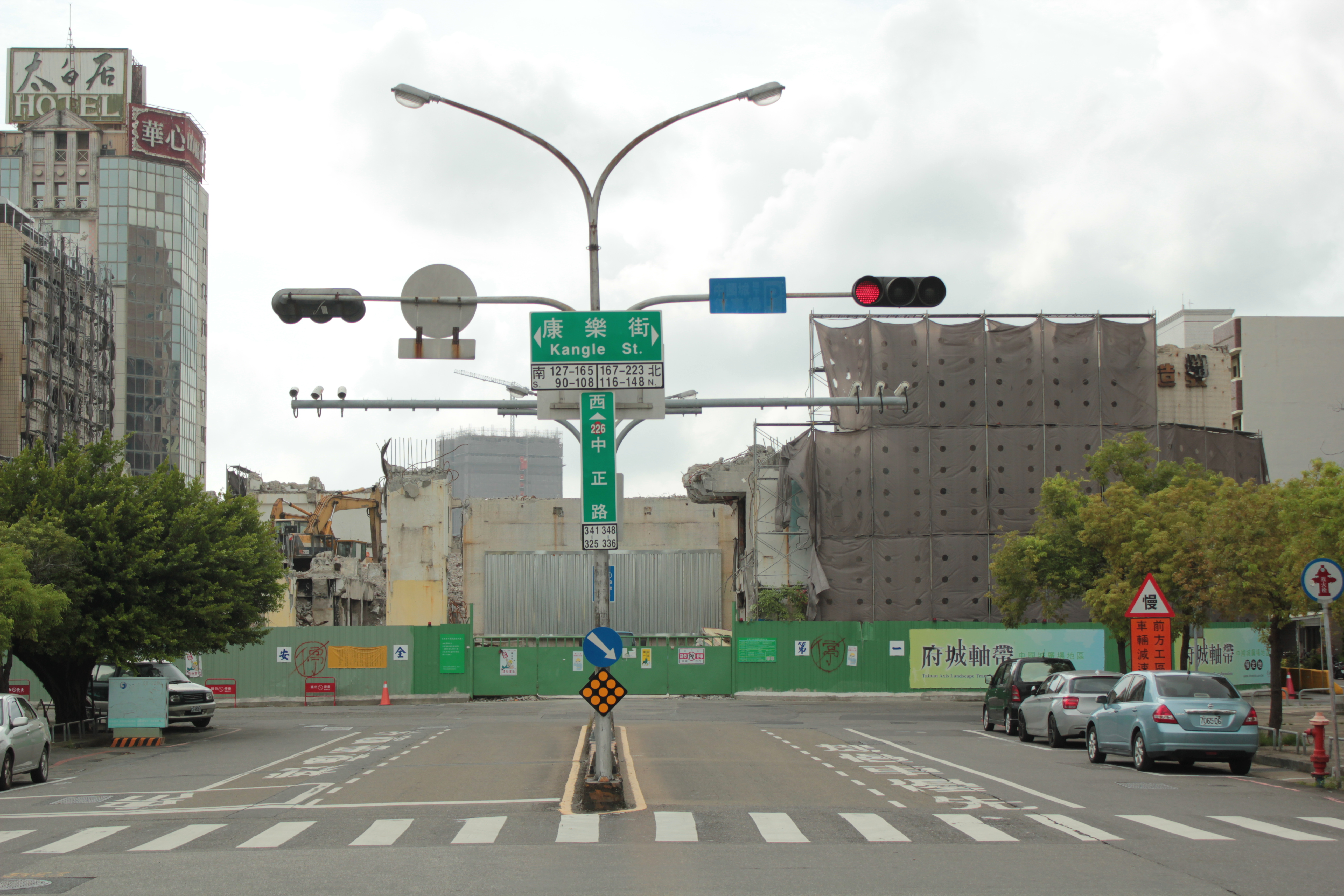 即將拆除完成的臺南中國城。